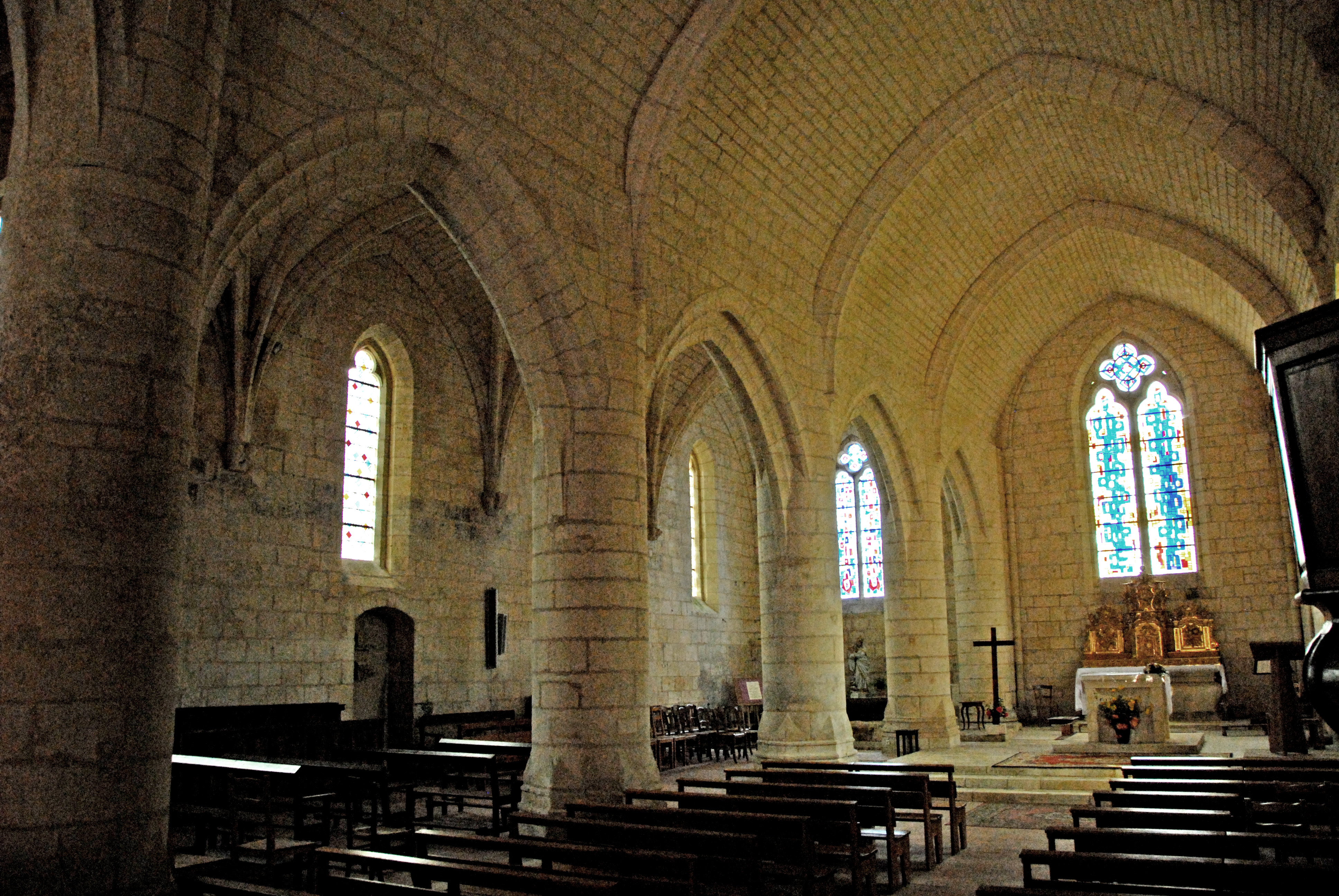 Corme-Royal, roman. Hauptschiff und Seitenschiff